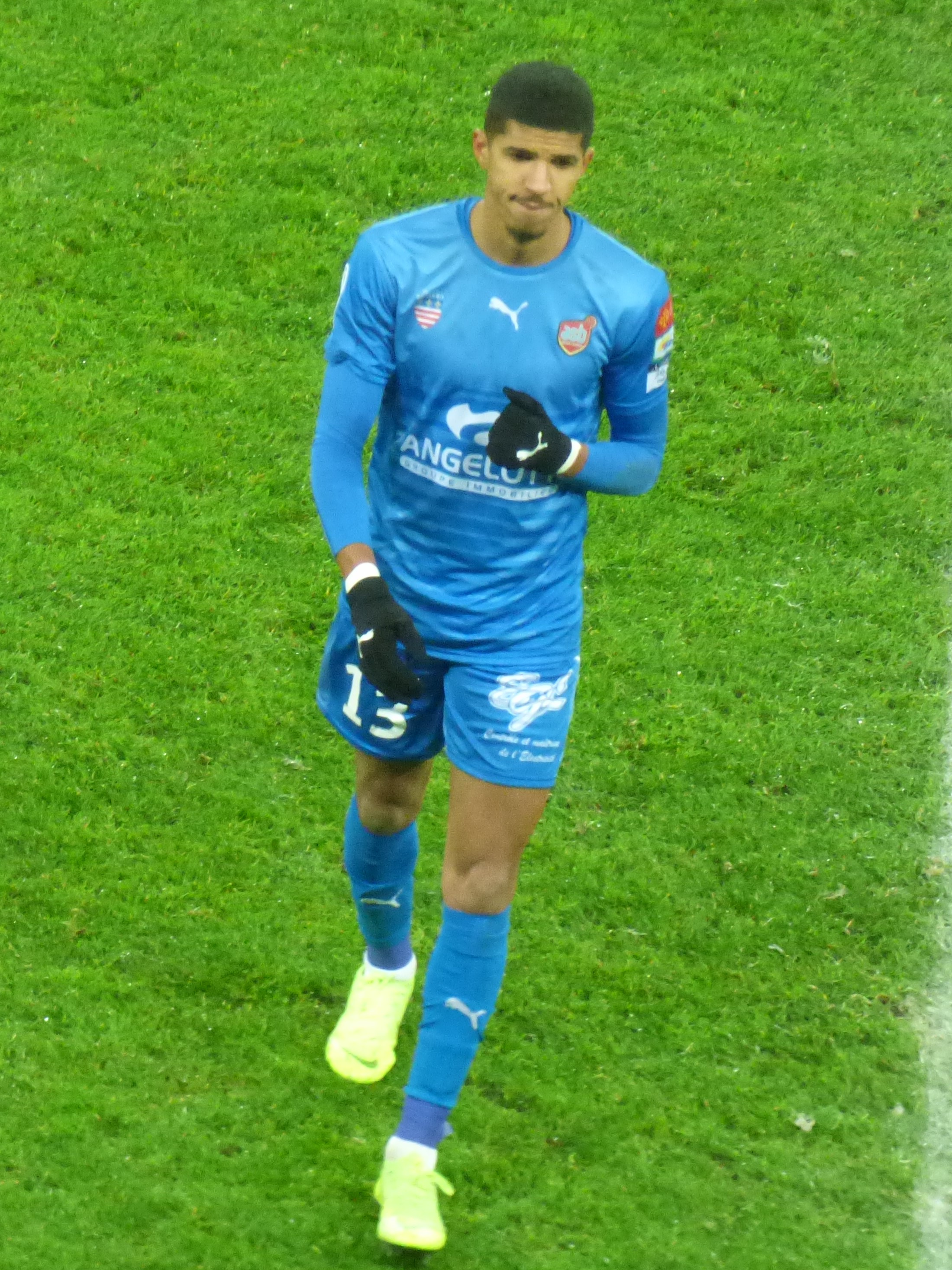 Dorian Bertrand pendant le match RC Lens / AS Béziers, comptant pour la 23ème journée du championnat de France de football de Ligue 2 2018-2019, le 4 février 2019, au Stade Bollaert-Delelis.